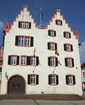 Foto vom 12.3.2006